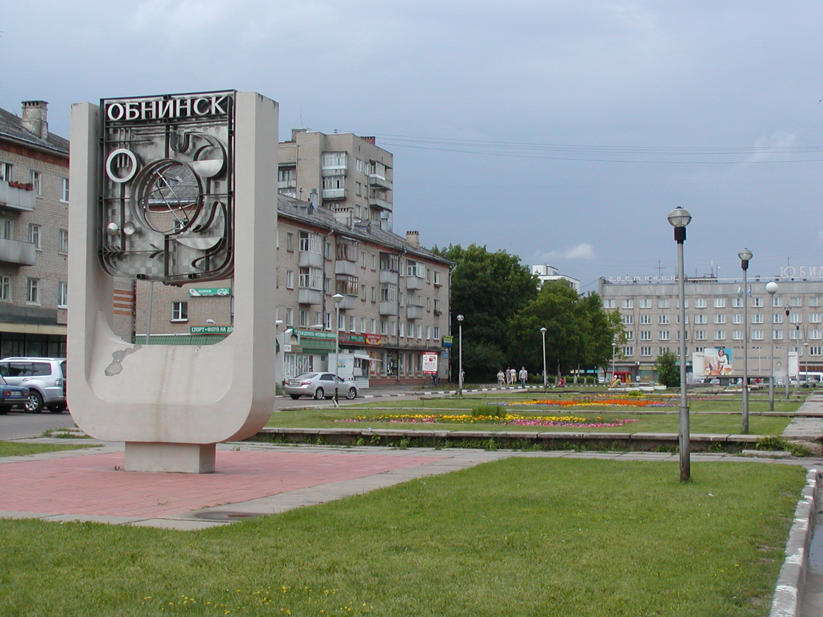 Общий вид улицы Лейпунского в Обнинске. На переднем плане знак Обнинска, на заднем плане гостиница "Юбилейная".